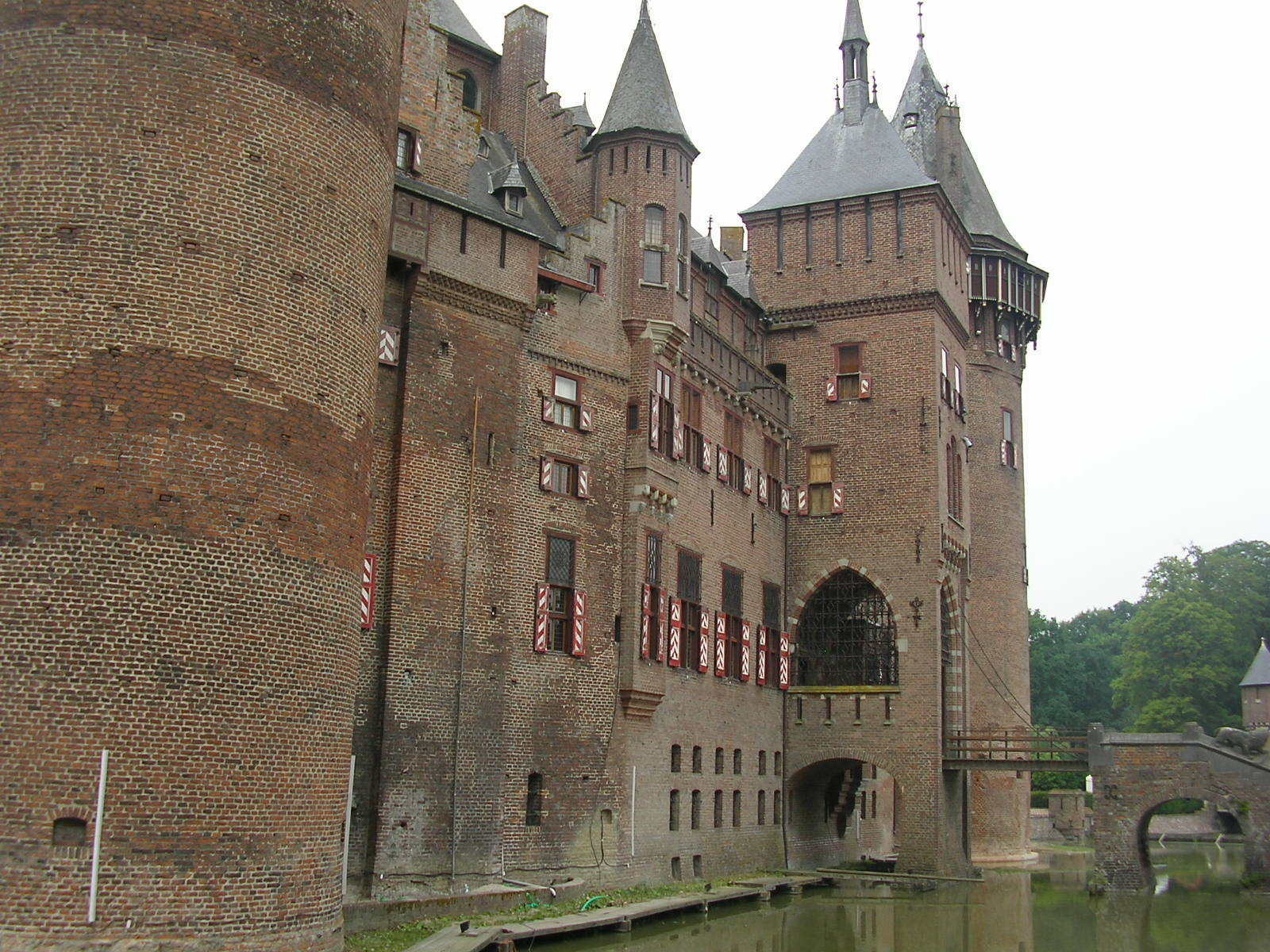 Kasteel De Haar 22 juli 2006 Gemaakt door wikipedia vrijwilliger gijsevers